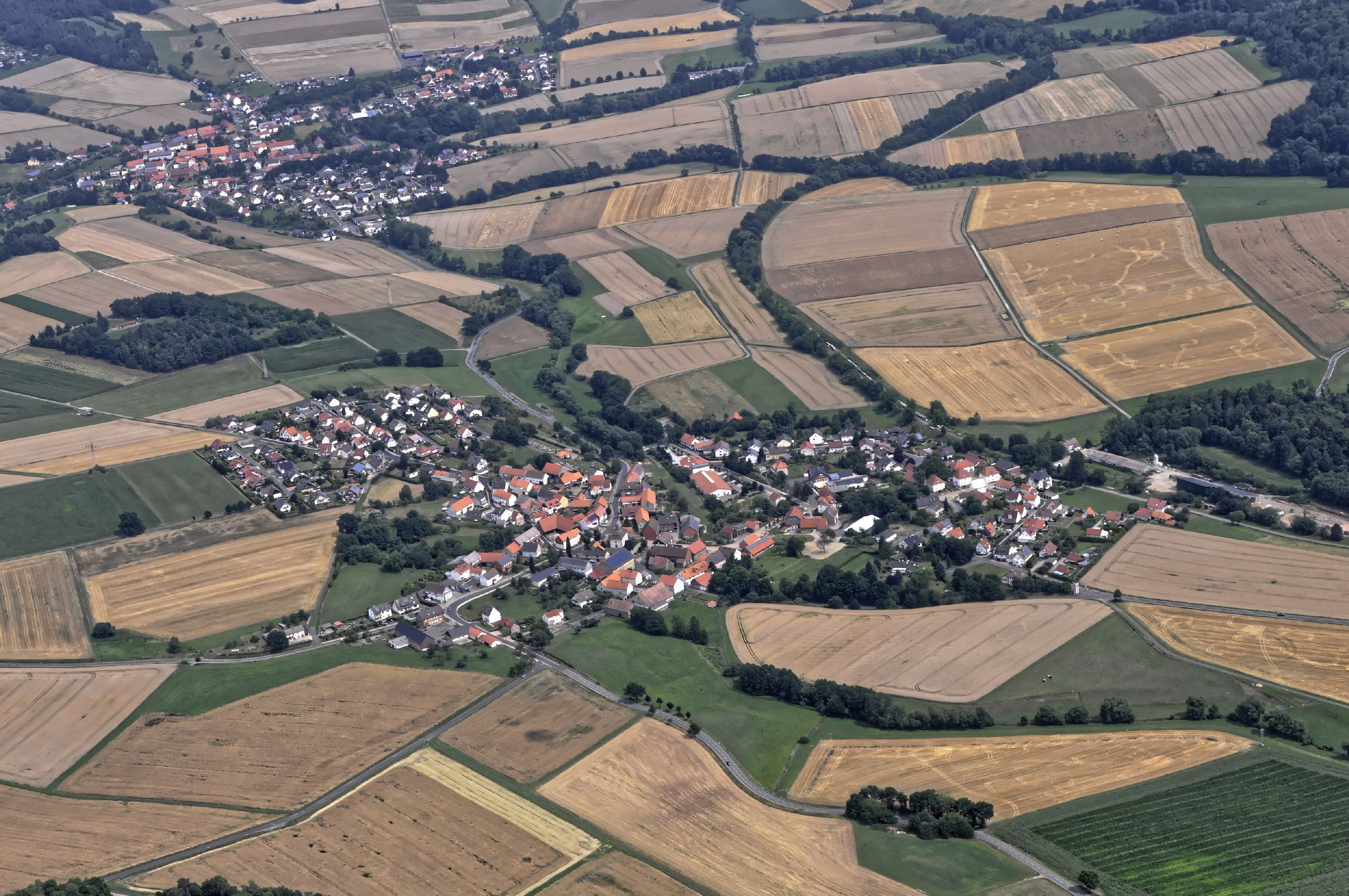 Bilder vom Flug Nordholz-Hammelburg 2015: Oberbeisheim (vorn), Niederbeisheim (links hinten).